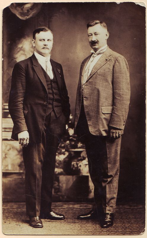 Mikas Petrauskas (1873 m. spalio 13 d. Palūšėje, Daugėliškio valsčius, Rusijos imperija – 1937 m. kovo 23 d. Kaune) – vargonininkas, dainininkas (tenoras), dirigentas, pedagogas, kompozitorius ir kultūros veikėjas. Balys Žygelis (1886 m. gruodžio 22 d., senuoju stiliumi sausio 3 d. Libertavos dvare, Balninkų valsčius – 1972 m. liepos 26 d. Kaune) – Lietuvos pedagogas, kooperatininkas, politinis bei visuomenės veikėjas.